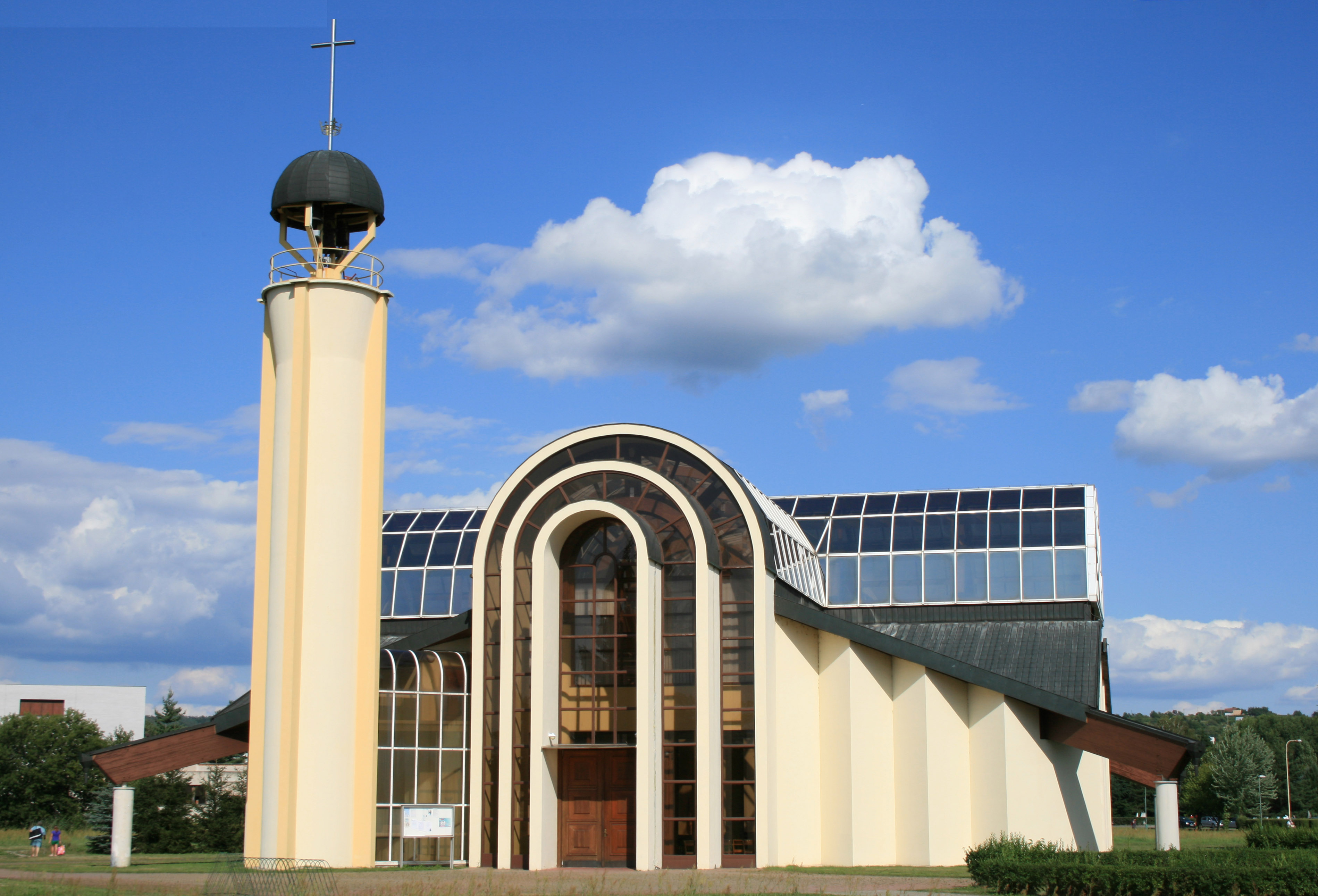 Moderný rímskokatolícky kostol v kúpeľnom areáli